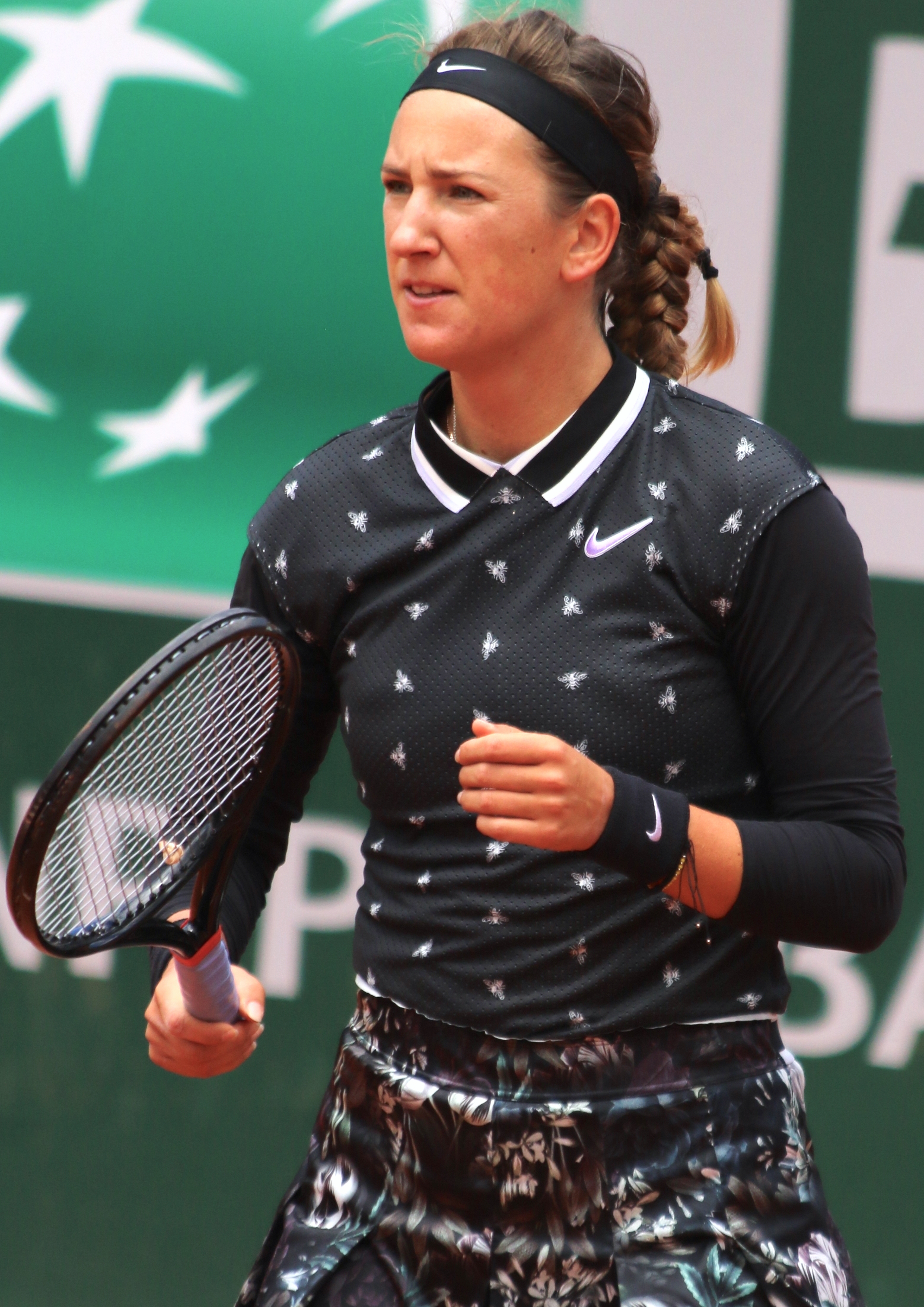 Azarenka RG19 (55)